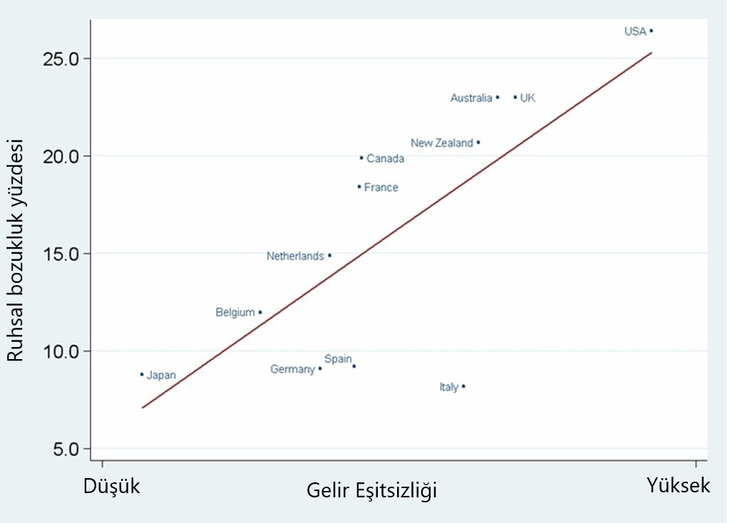 Ruhsal bozukluk yaygınlığının, gelir eşitsizliği ile karşılaştırması